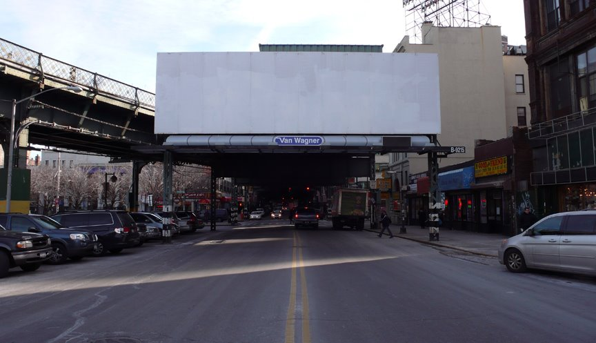 My version of Rauschenberg